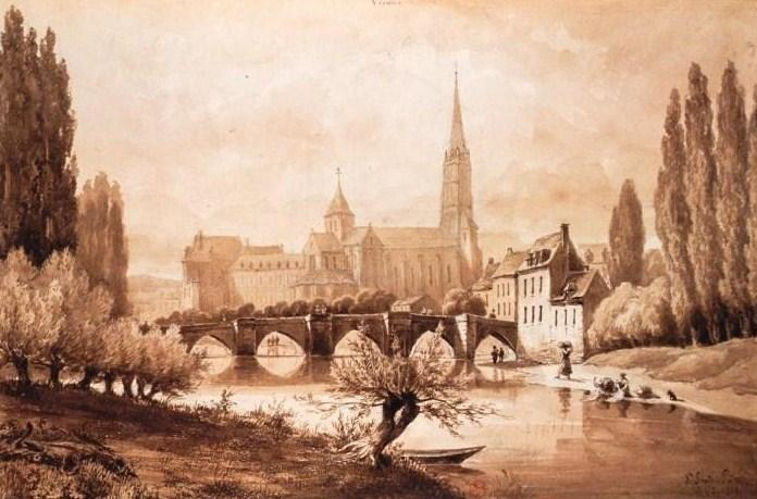 Lavandières et pont de pierre sur la Gartempe à Saint-Savin (Vienne). Dessin à la mine de plomb et lavis à l'encre brune ; 25,8 x 38,8 cm